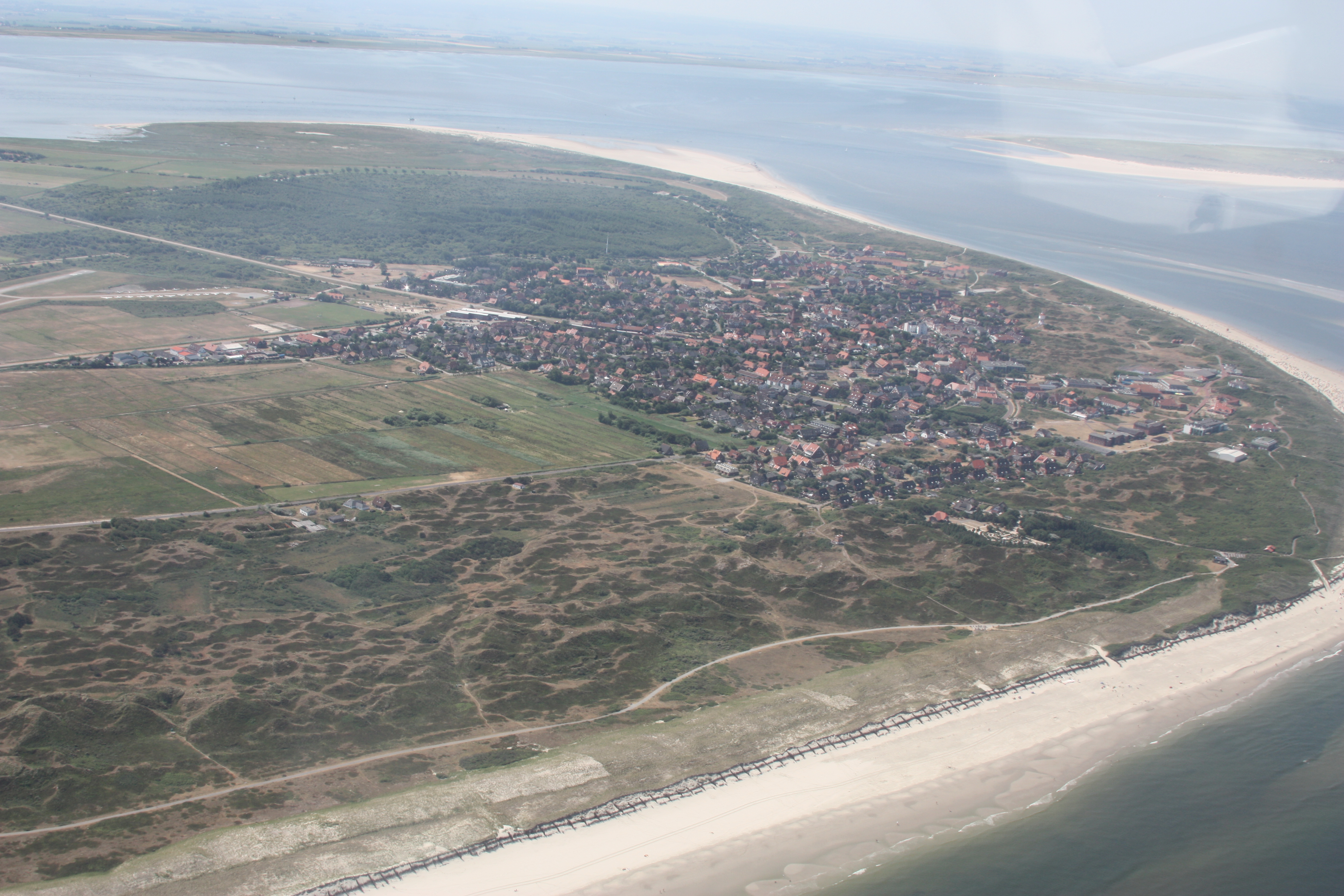 Flug über Langeoog - von Westen kommend, am Nordstrand entlang; Flughöhe 500 m = 1500 ft; Juli 2010